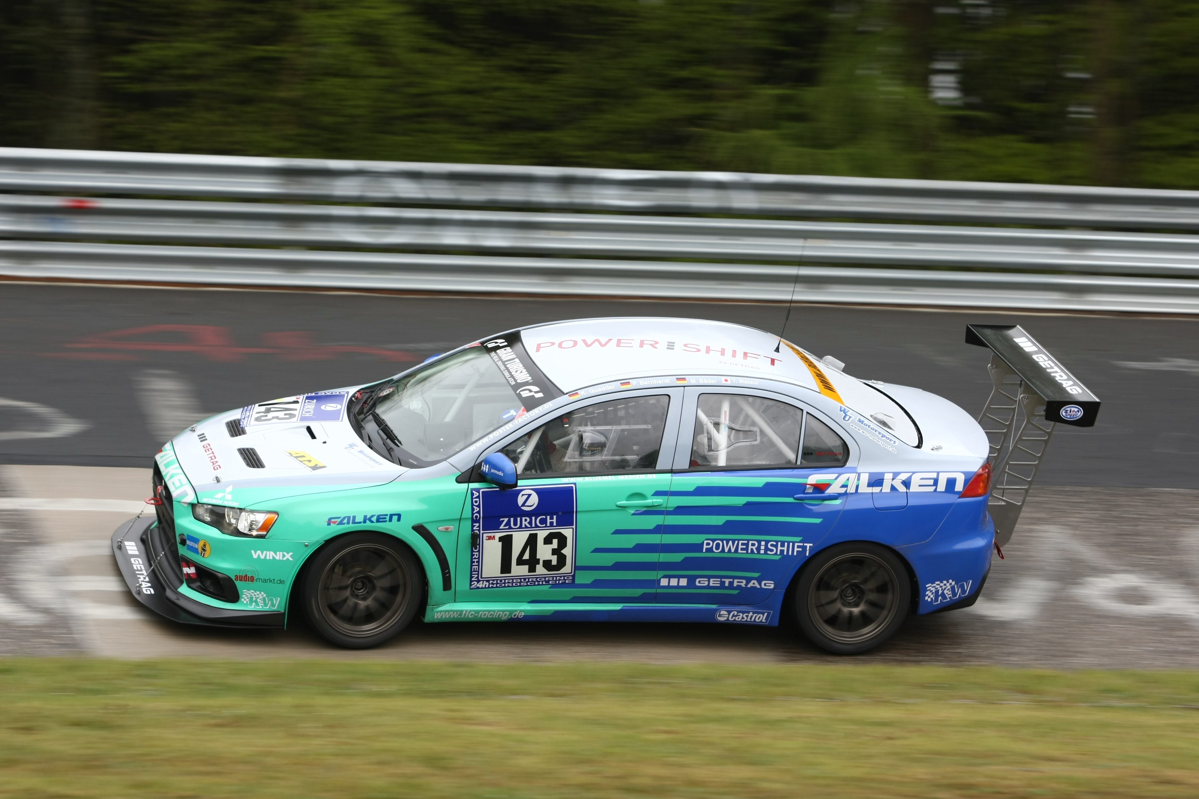 FALKEN Motorsports Mitsubishi Lancer Evo 10